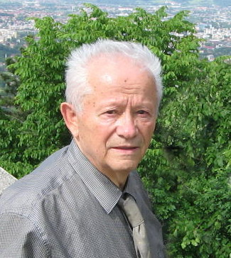 Fotografija je snimljena maja 2008. godine na Banj brdu (Šehitluci) iznad Banja Luke. D.J. Licensing